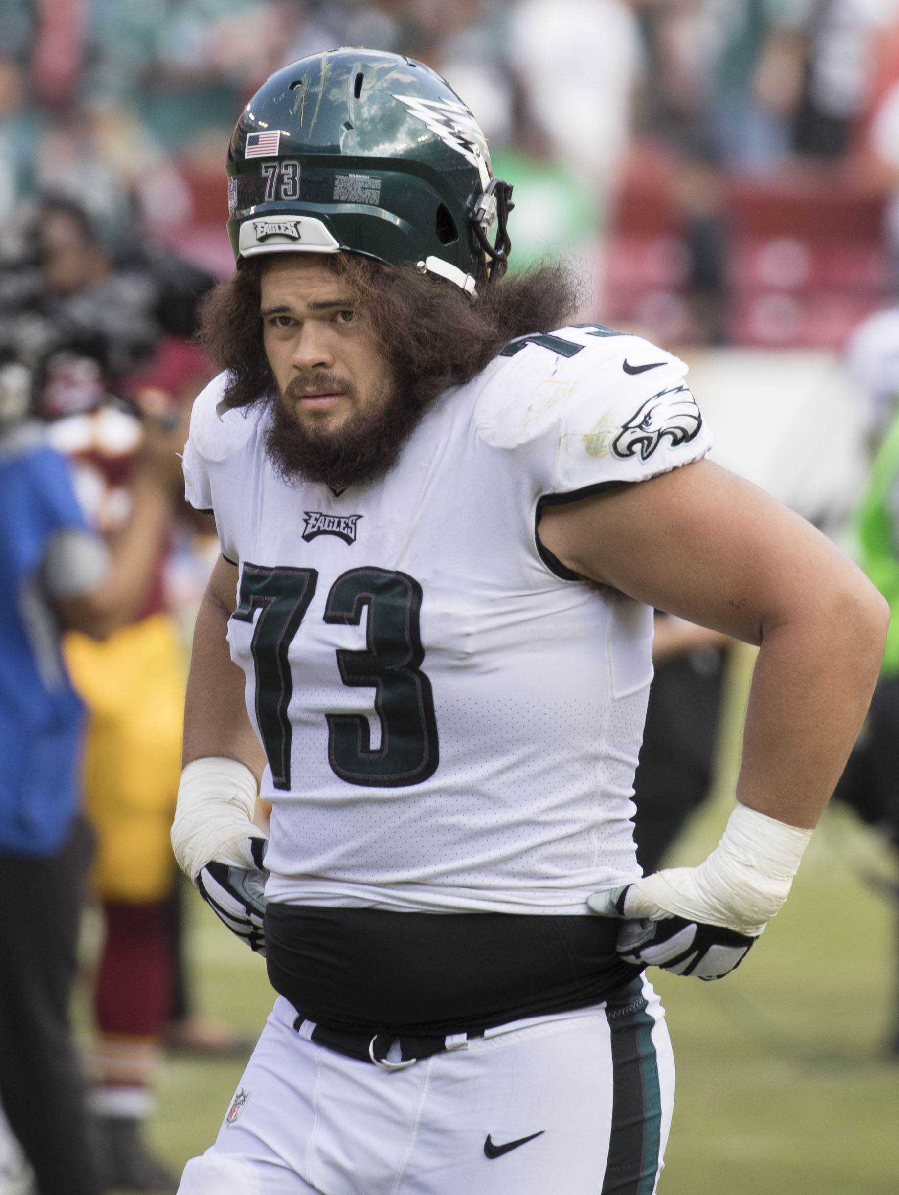 Eagles at Redskins 9/10/17